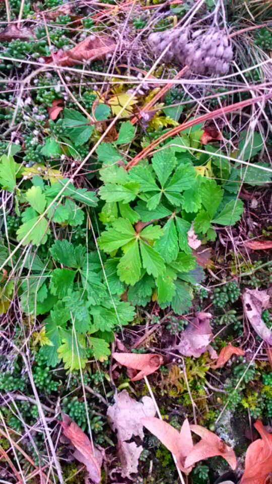 Potentilla arenaria - Mochna písečná je v Radotínském údolí často vyskytující se druh